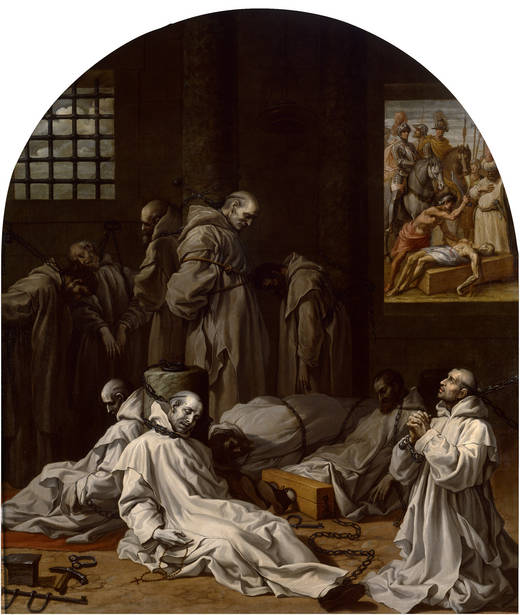 Vicente Carducho. Prisión y muerte de los diez miembros de la cartuja de Londres. 1632. Óleo sobre lienzo. Medidas: 337cm x 297’5cm..